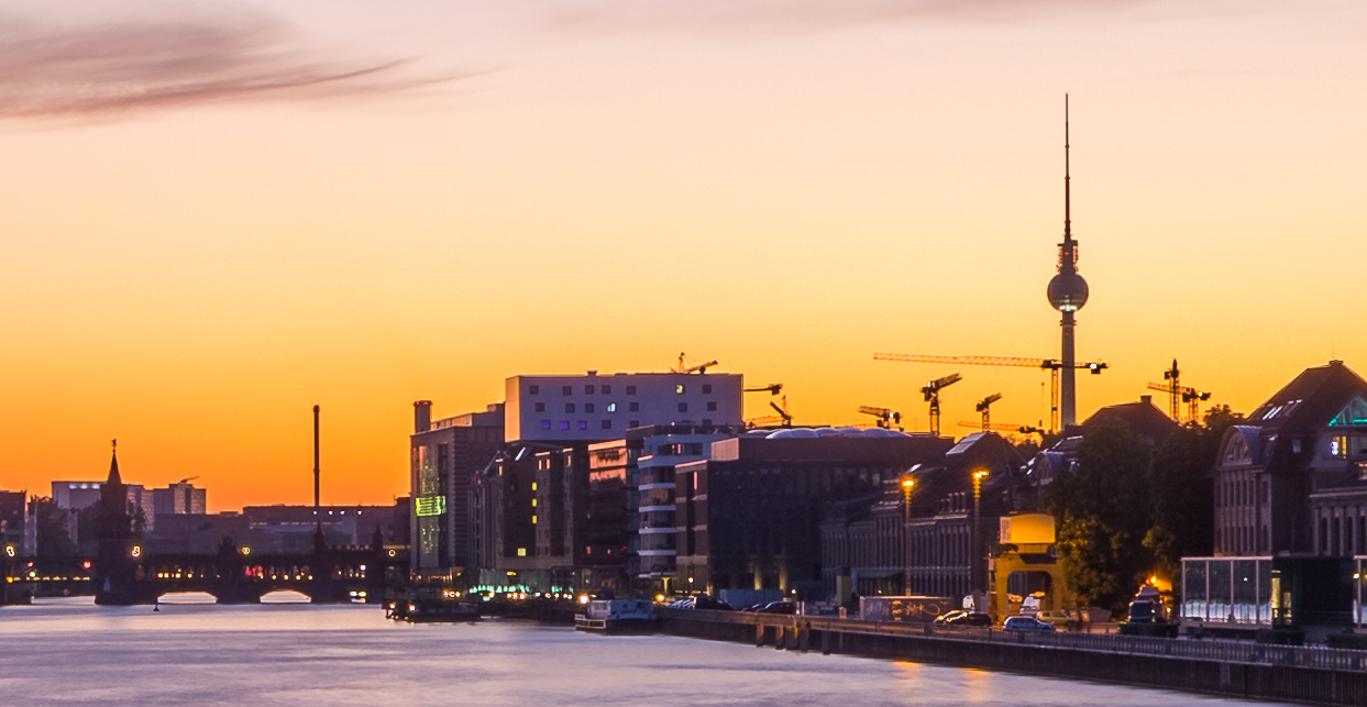 Blick von der Elsenbrücke in Richtung Oberbaumbrücke in Berlin bei Sonnenuntergang.